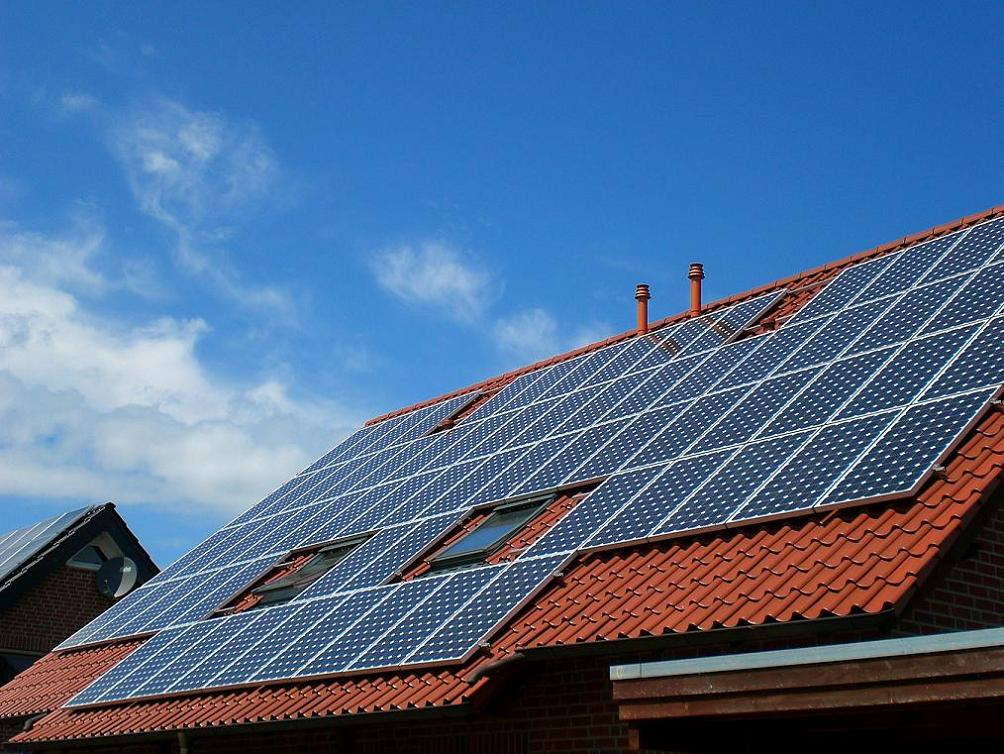 PV-Anlage: Einfamilienhaus in Ibbenbüren